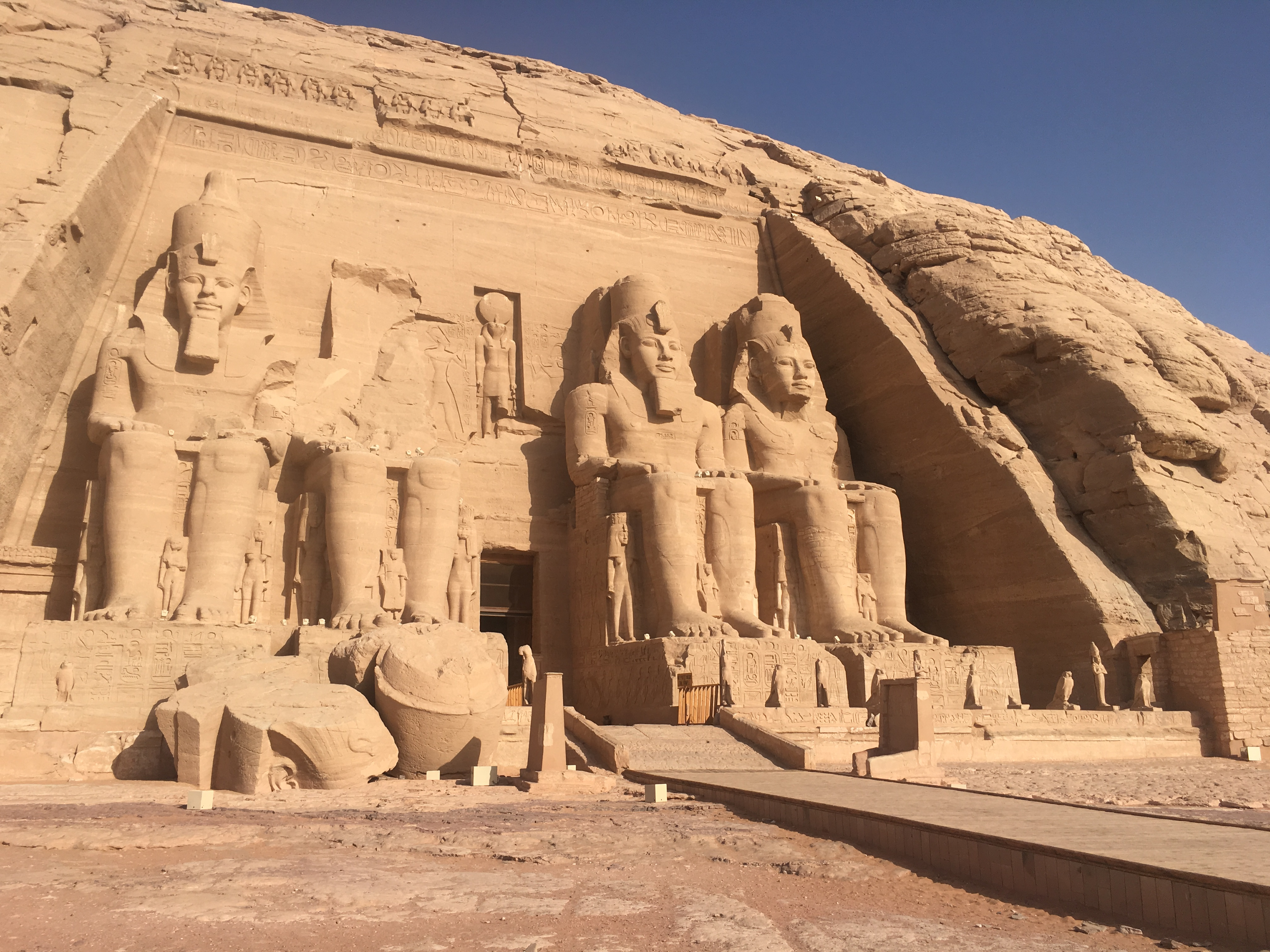 Templo de Ramses en Abu Simbel - Egipto